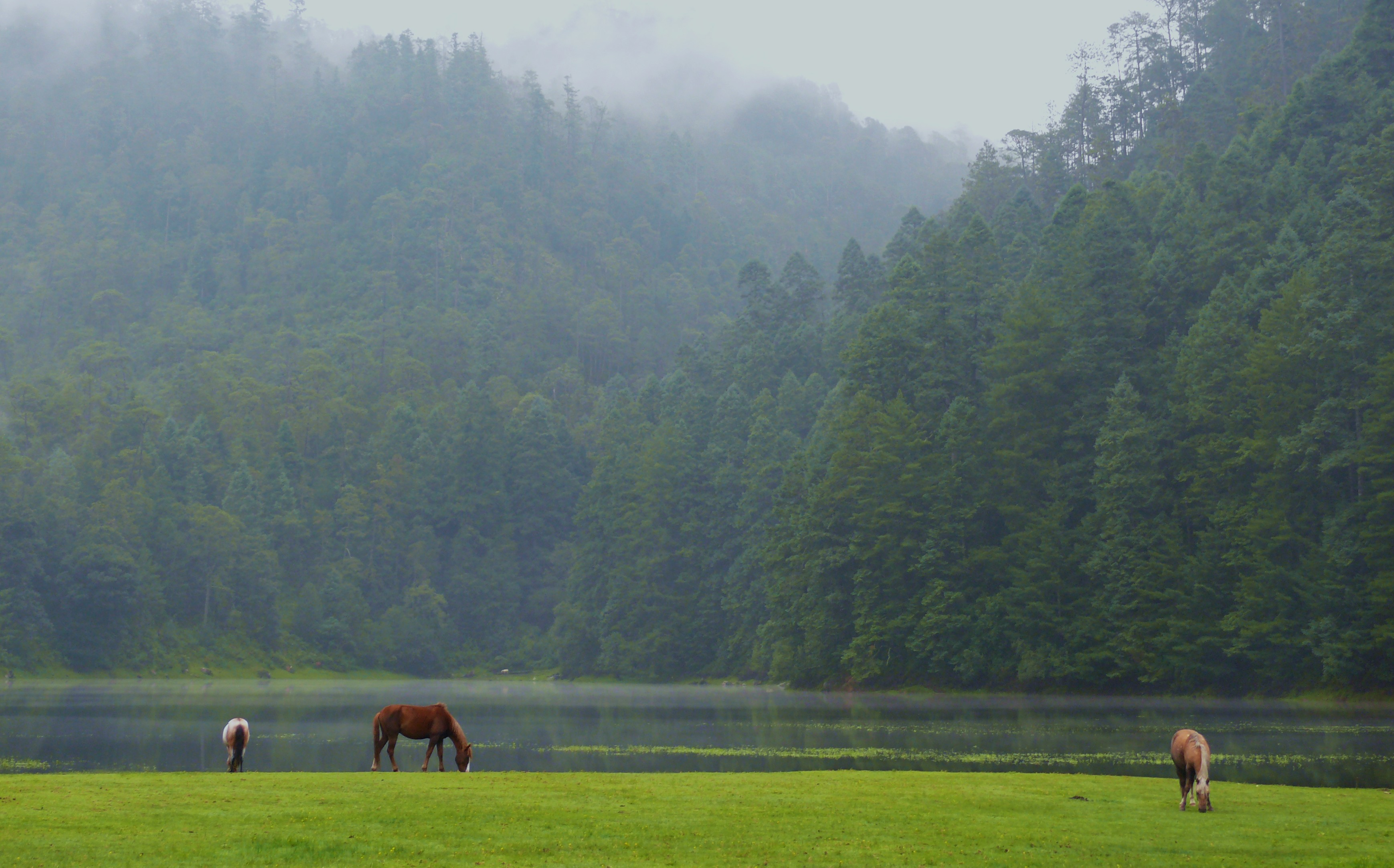 Caballos pastando en un paraje cercano a una de las lagunas de Zempoala